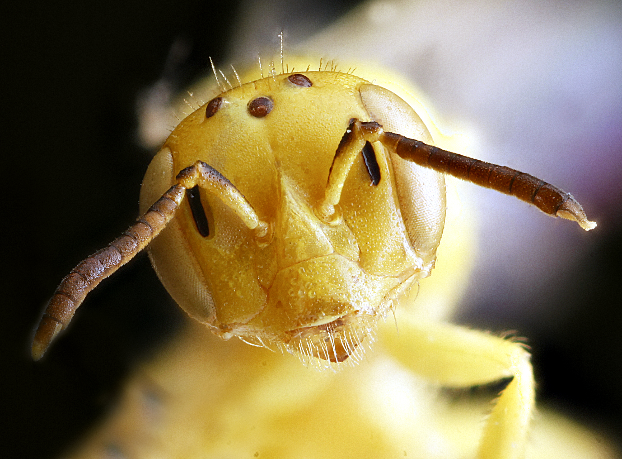 Perdita luteola, female